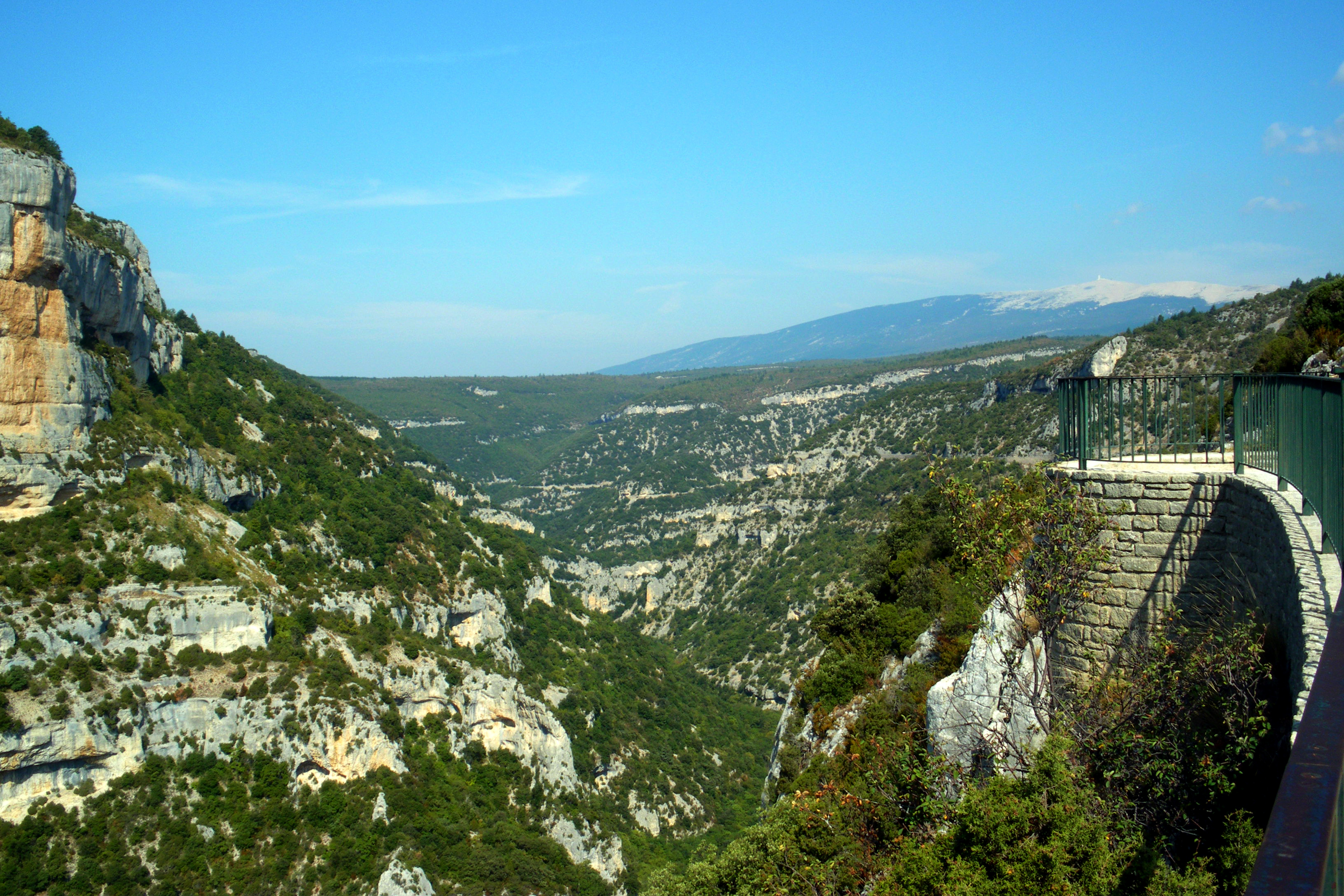 Gorges de la Nesque et vue sur le Ventoux, Vaucluse, France